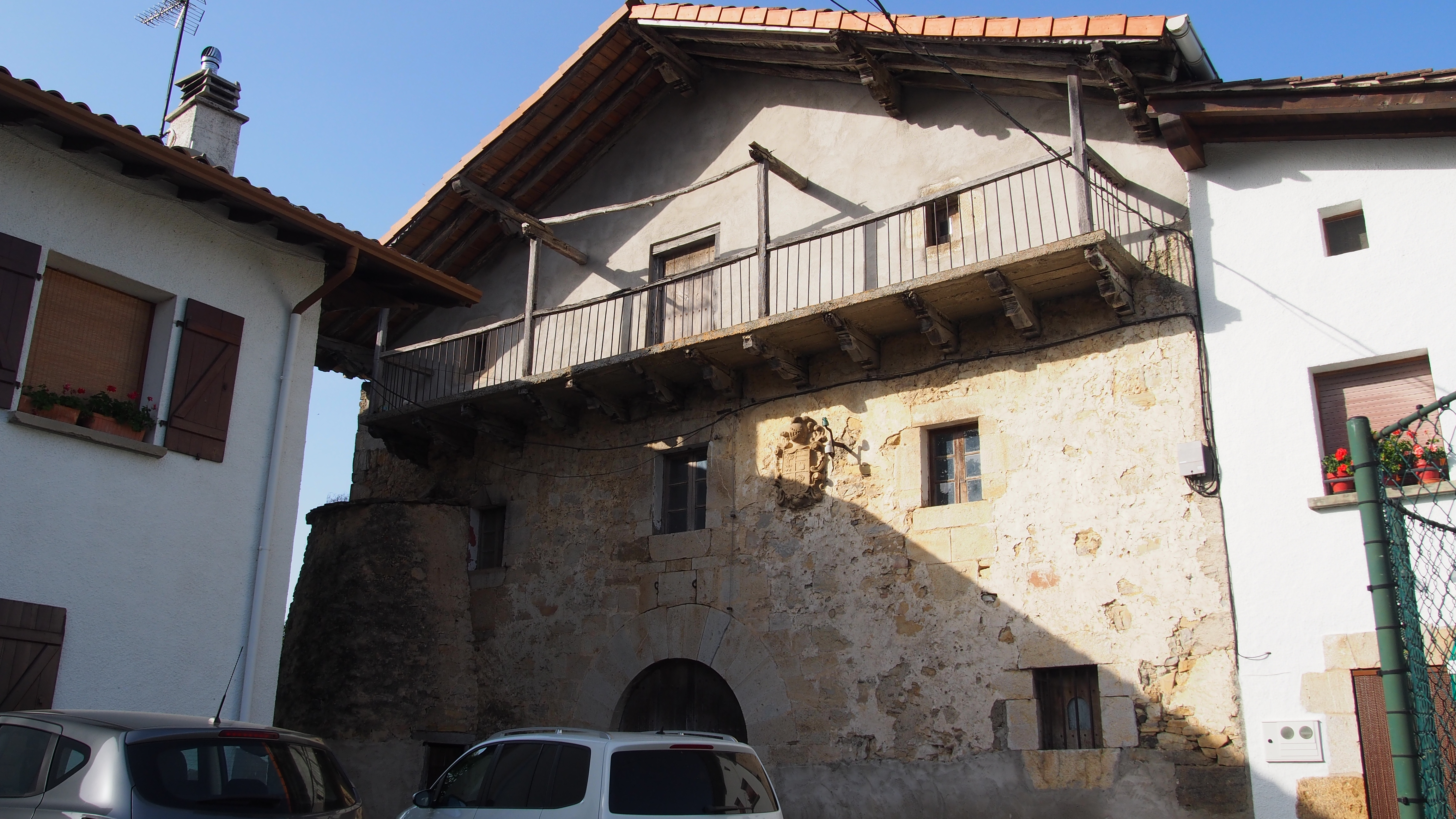 Erregerena etxea, Gelbentzun, bere aurrealdean ogi labea duelarik.